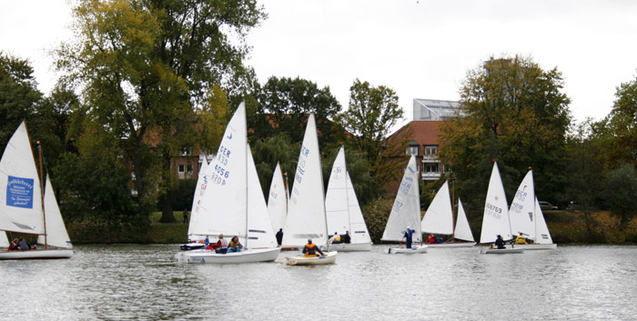 Absegeln beim Segel-Club Münster auf Aasee